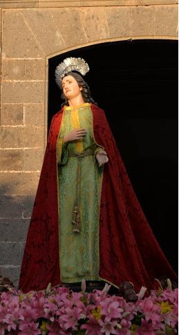 San Juan Apóstol guia